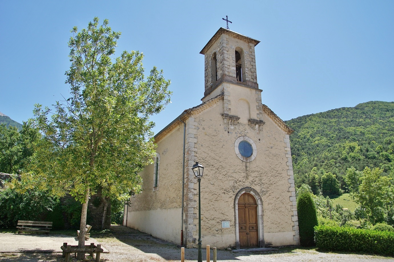 département de la Drôme